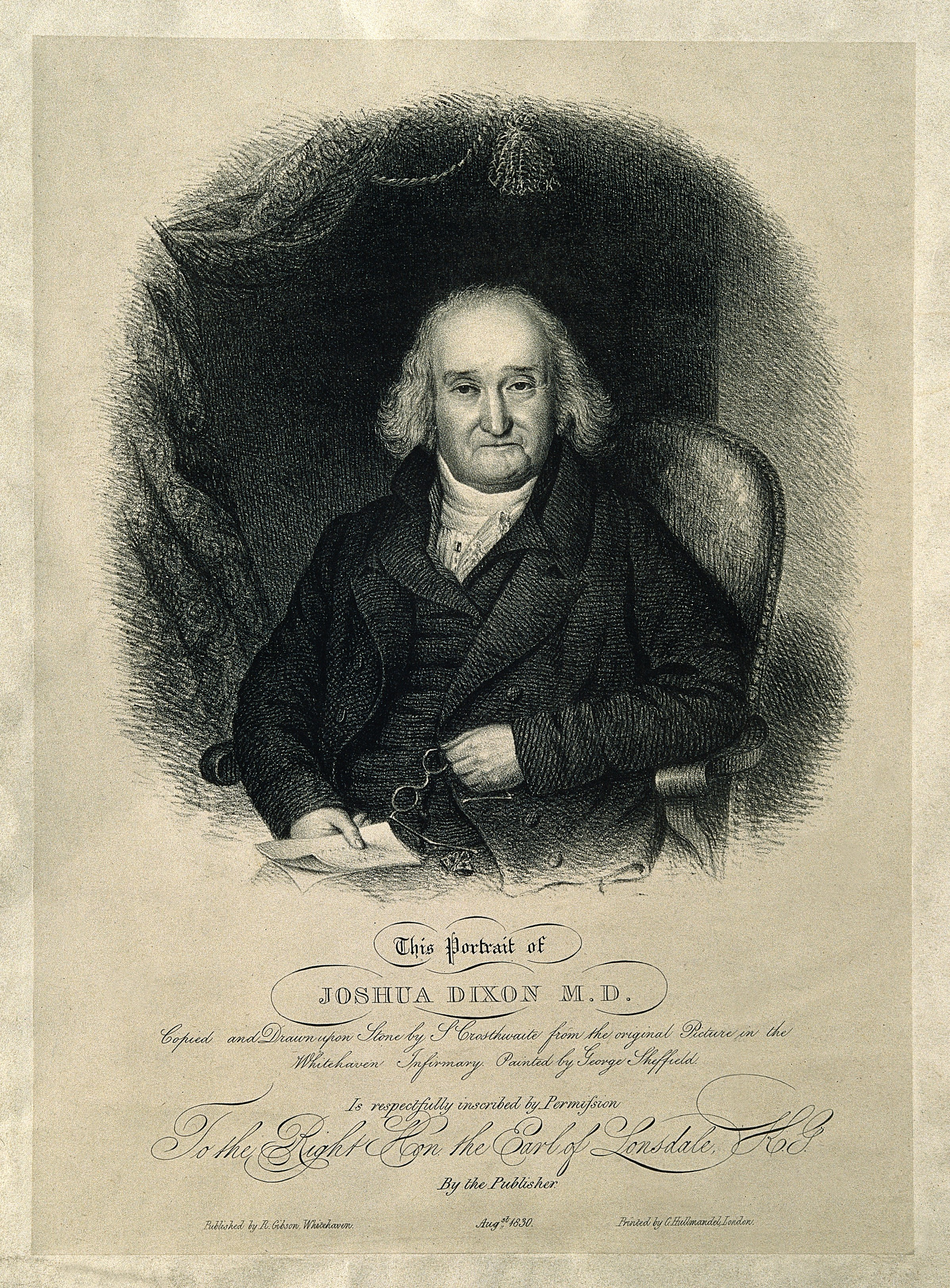 Topic-LCSH: Eyeglasses. Genre/Technique: Portrait prints. Lithographs. Subject name: Dixon, Joshua, 1745-1825.